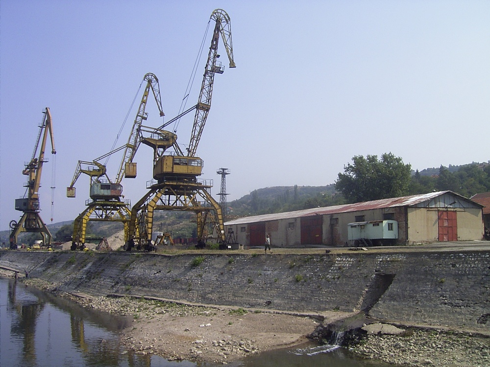 Orjachowo Bulgaria 2004 Port